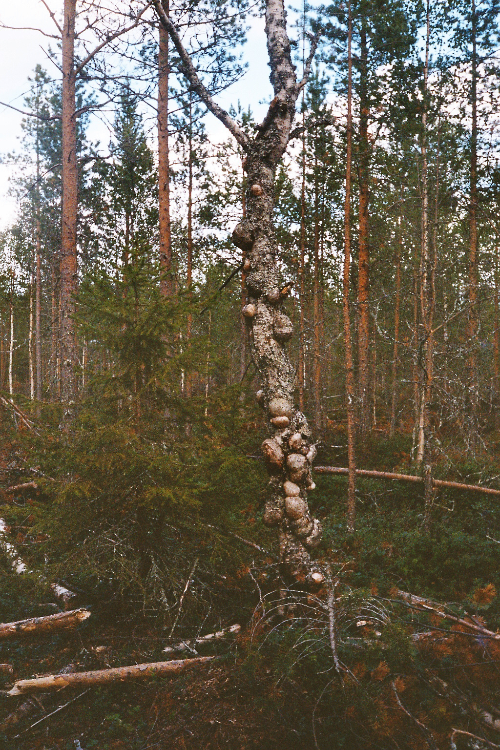 Kuva pahkaisesta koivusta lapissa kesällä 2005. Tämä kuva on itse kuvattu suvun omilla mailla. Lisensoitu aluksi -palvelussa CC-by-Attr-lisenssilla, nyt myös GFDL. Sama kuva löytyy myös osoitteesta